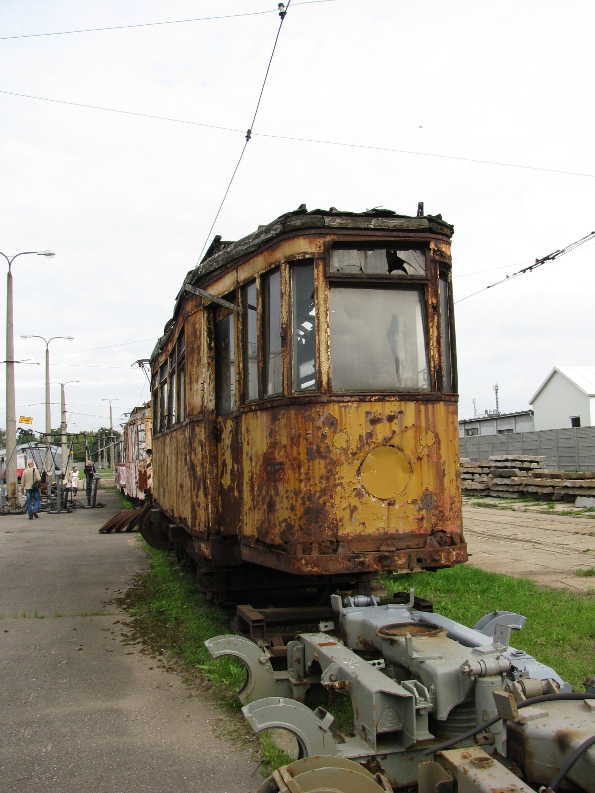 Lilpop III D